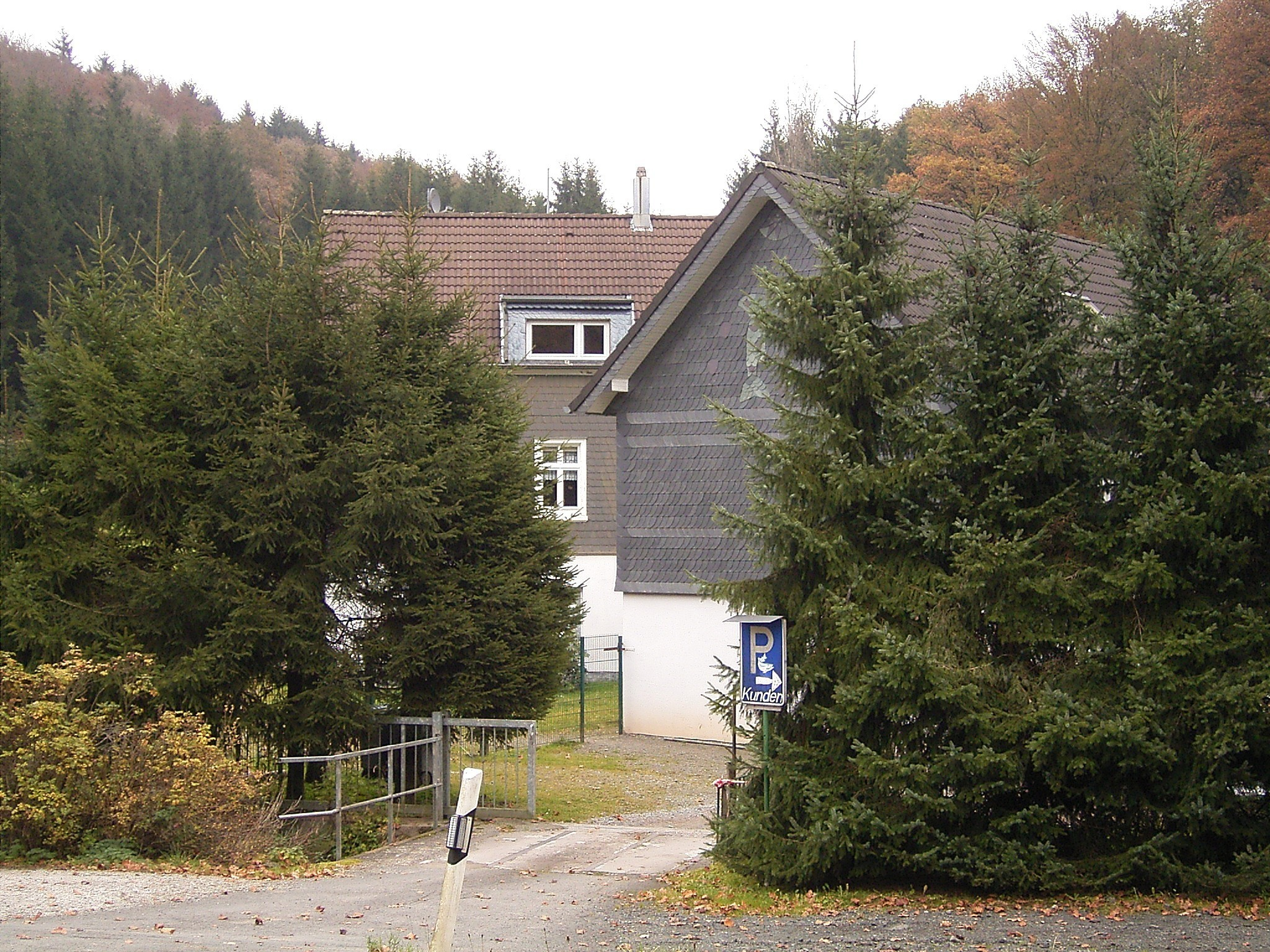 Radevormwald